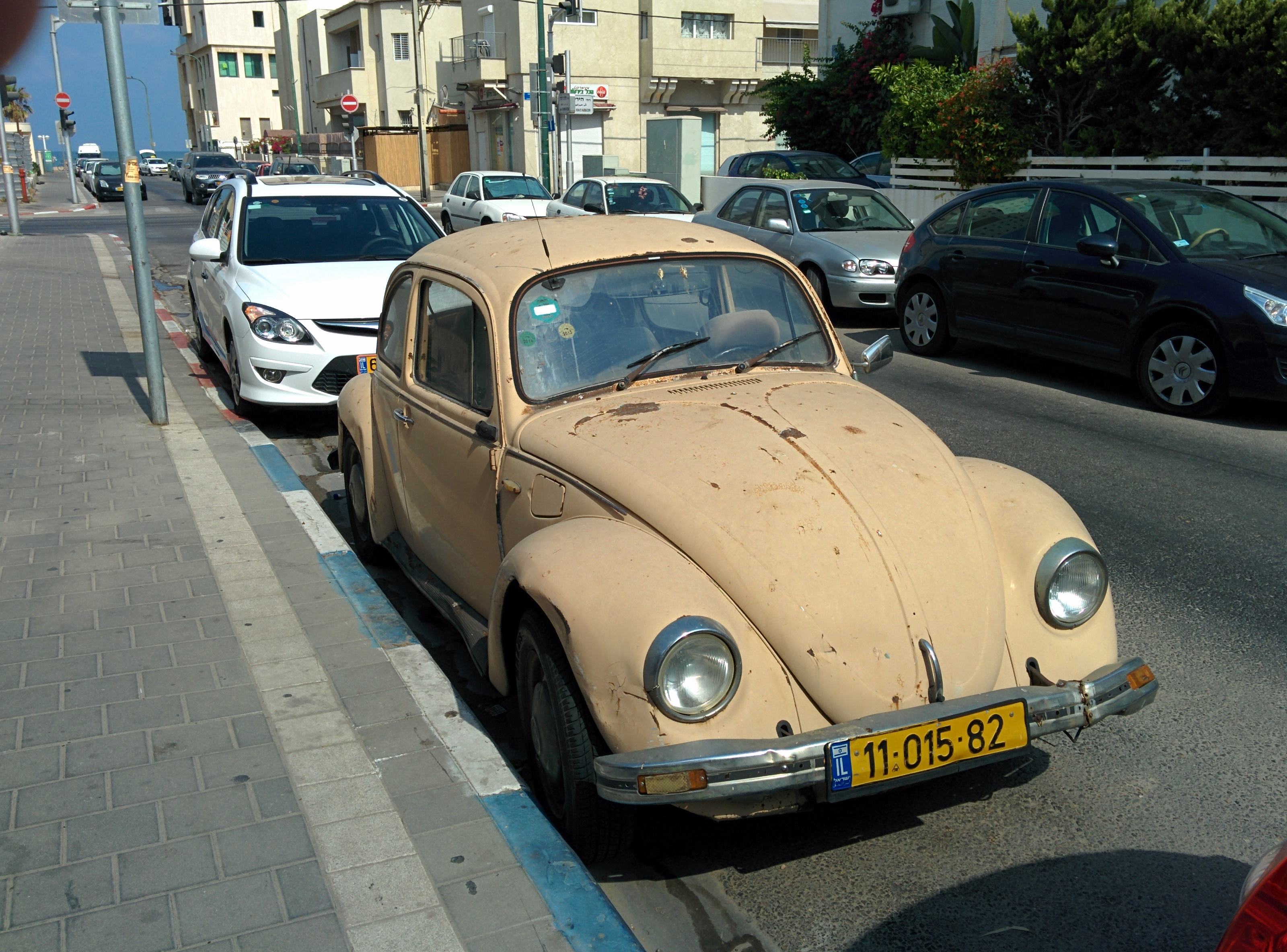 Tel Aviv Rav Kook Old beat